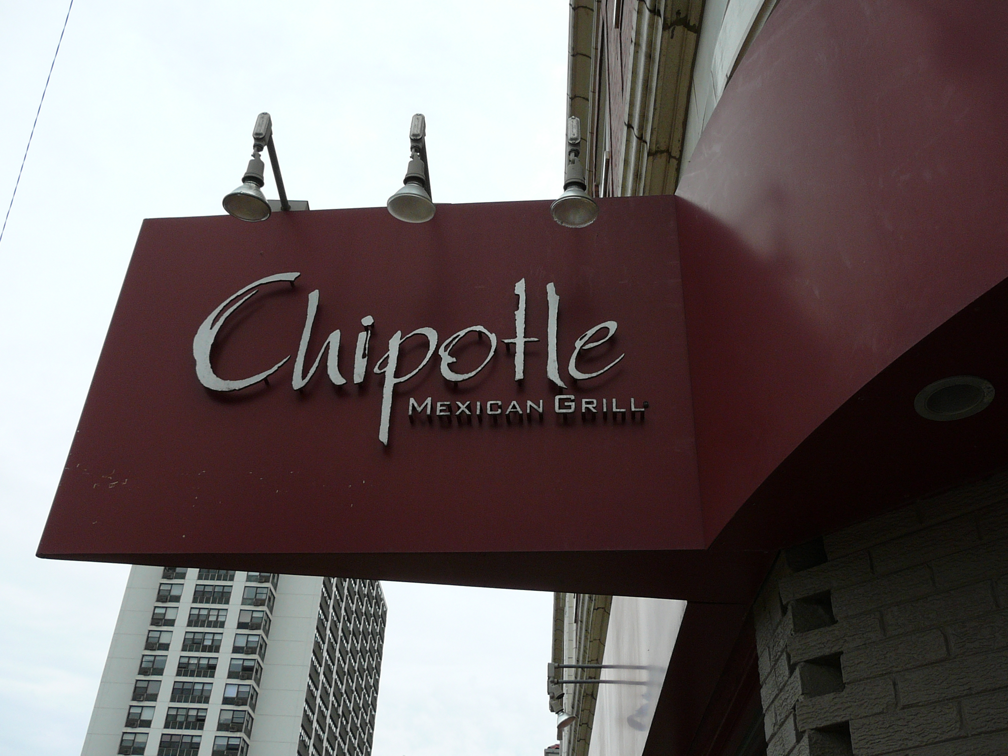 Restaurant Chipottle Mexican Grill in Chicago